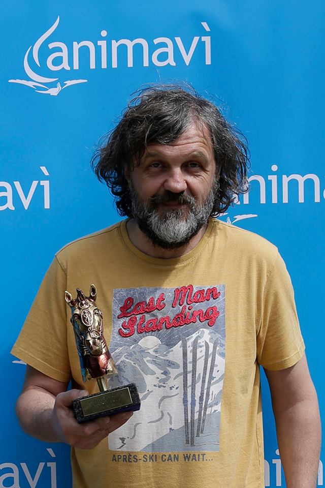 Emir Kusturica recibe el Bronce Dorado por su carerra artística. 14 de Julio de 2016.